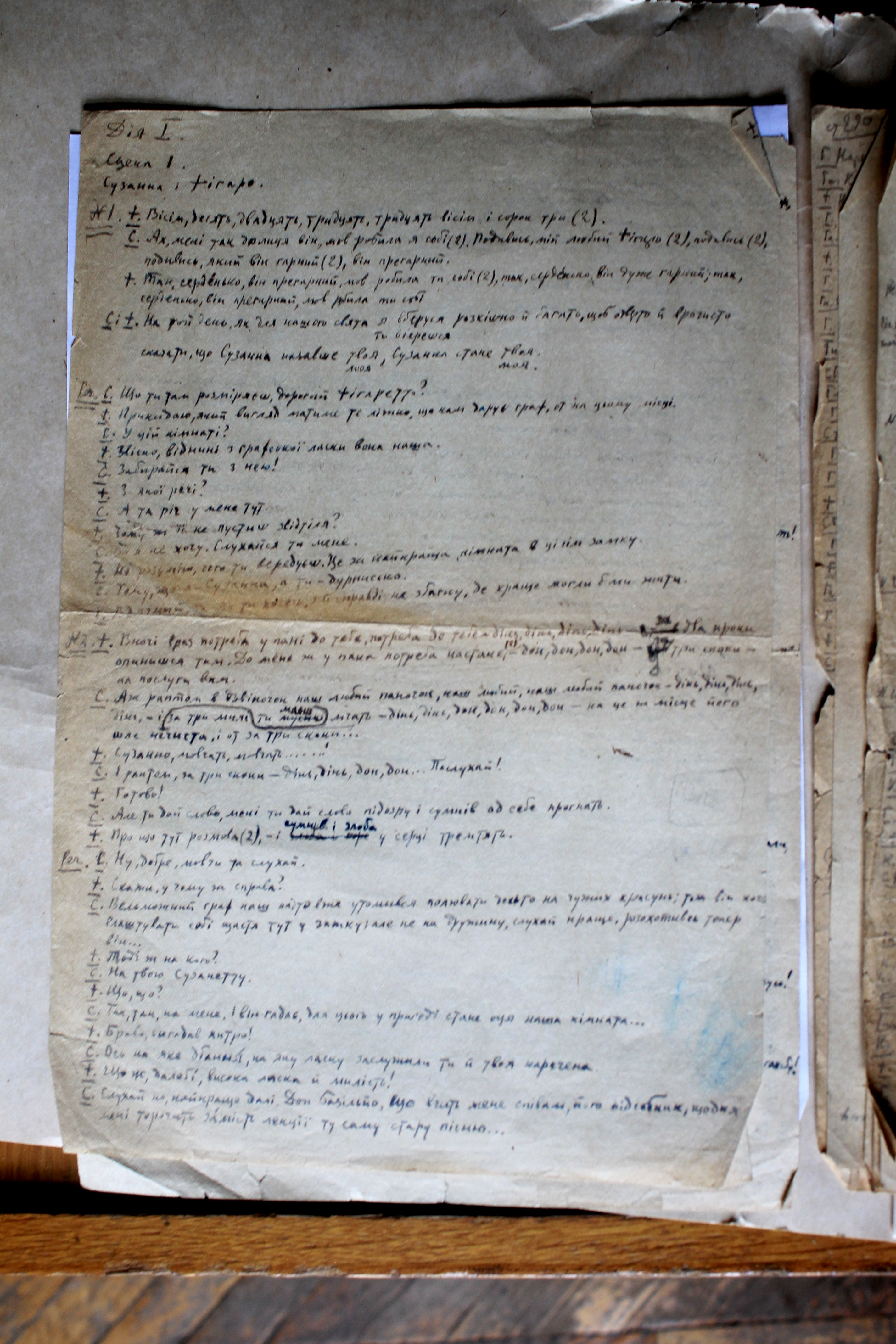 Рукопис Євгена Дроб'язка із перекладом лібрето опери В.А. Моцарта "Весілля Фігаро"